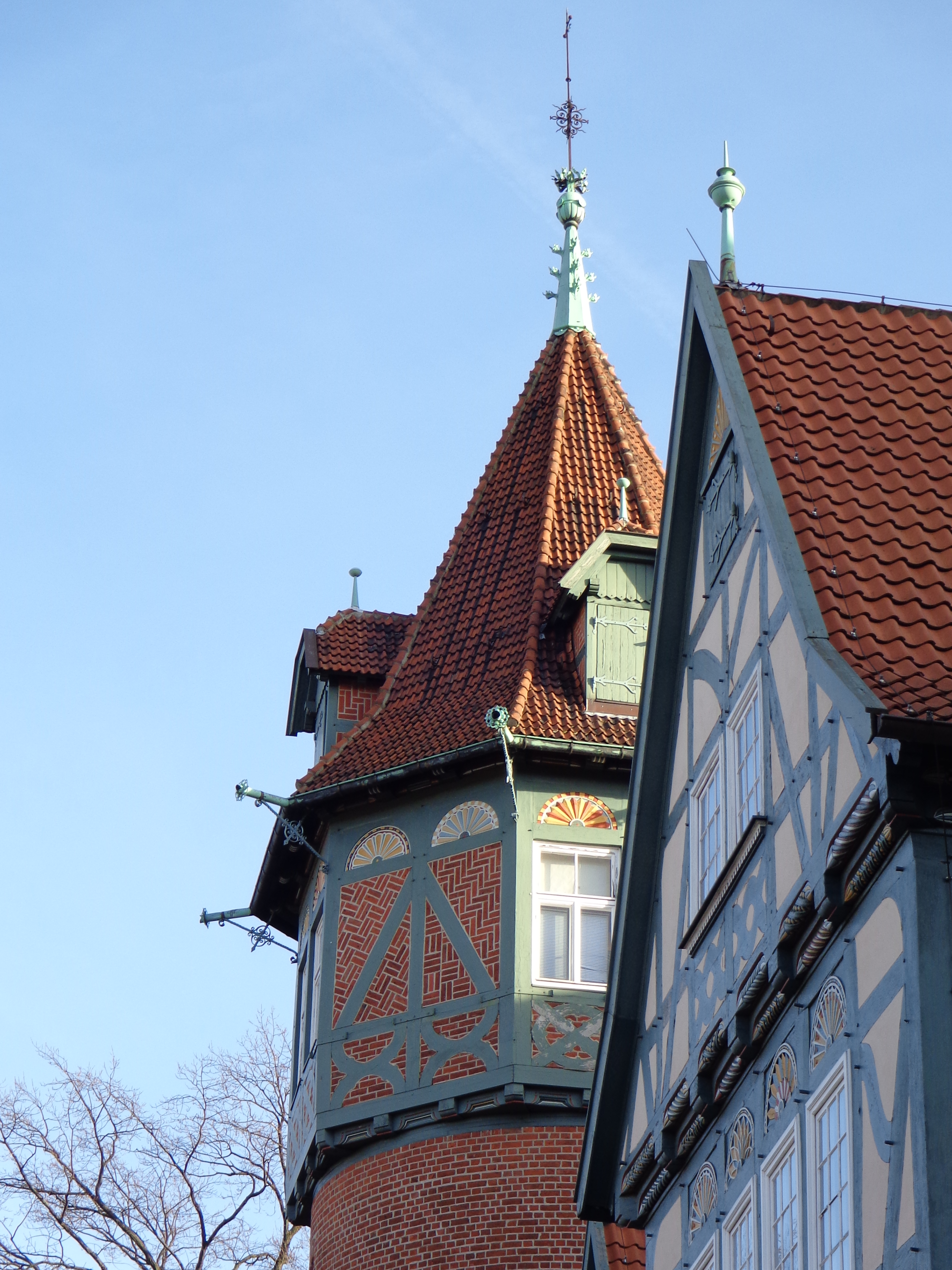 Der Lister Turm in Hannover 2013